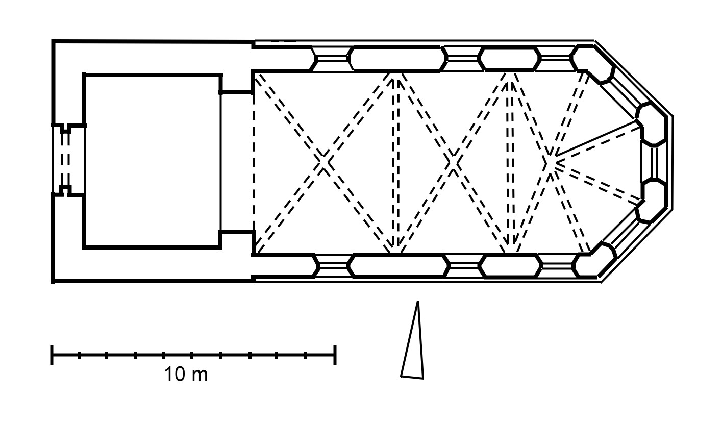 Templerkirche in Braunschweig, 1830 abgerissen, Grundrissrekonstruktion nach einer Zeichnung von A. A. Beck um 1750, nach Binding und Untermann, 1984, Kleine Kunstgeschichte der mittelalterlichen Ordensbaukunst in Deutschland, S.312